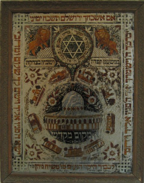 משה בן יצחק (פרס לפני 1870 - ירושלים, שנות ה-30), "מזרח" (1910), ציור מאחורי זכוכית, אוסף משפחת גרוס, תא.